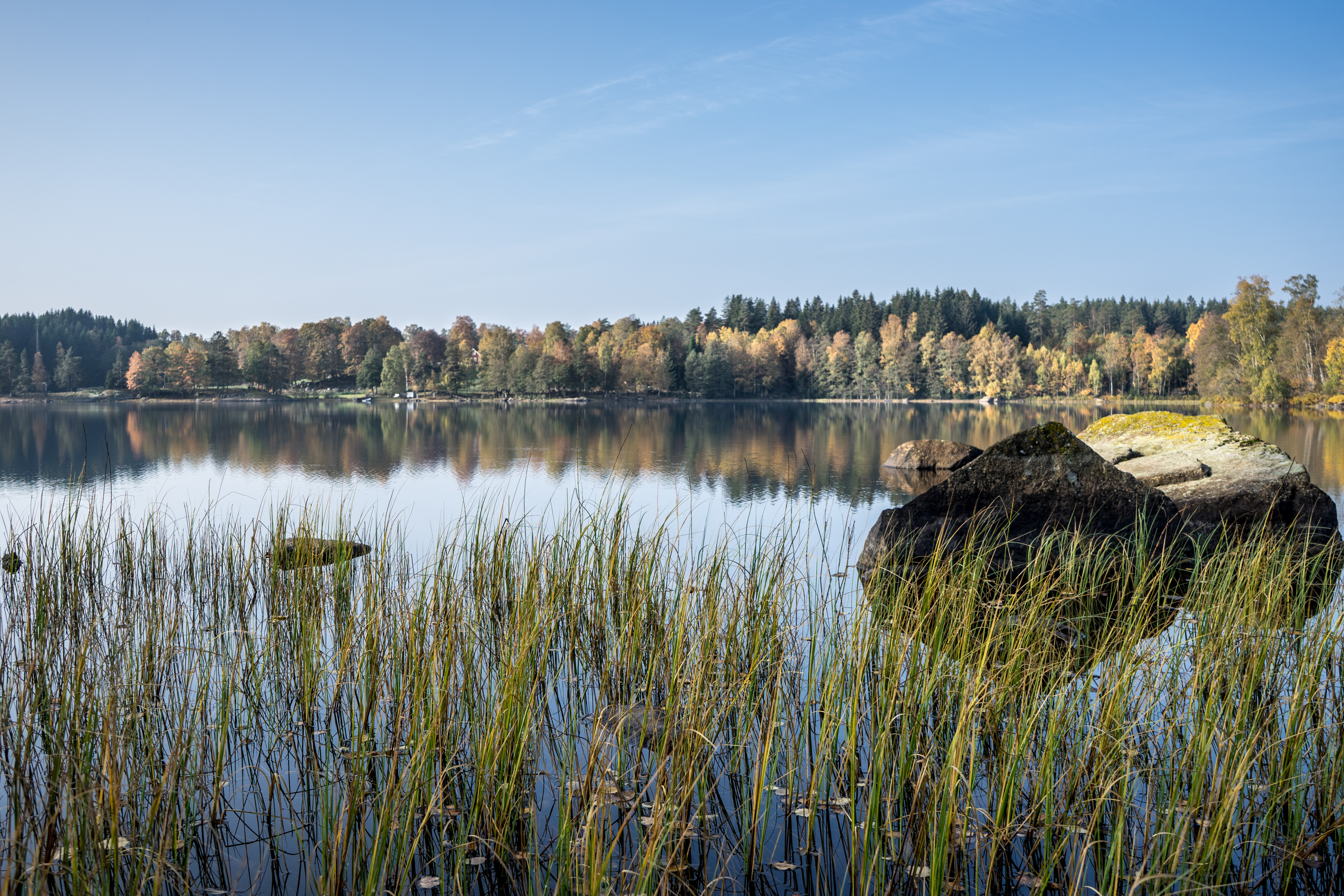 Älten